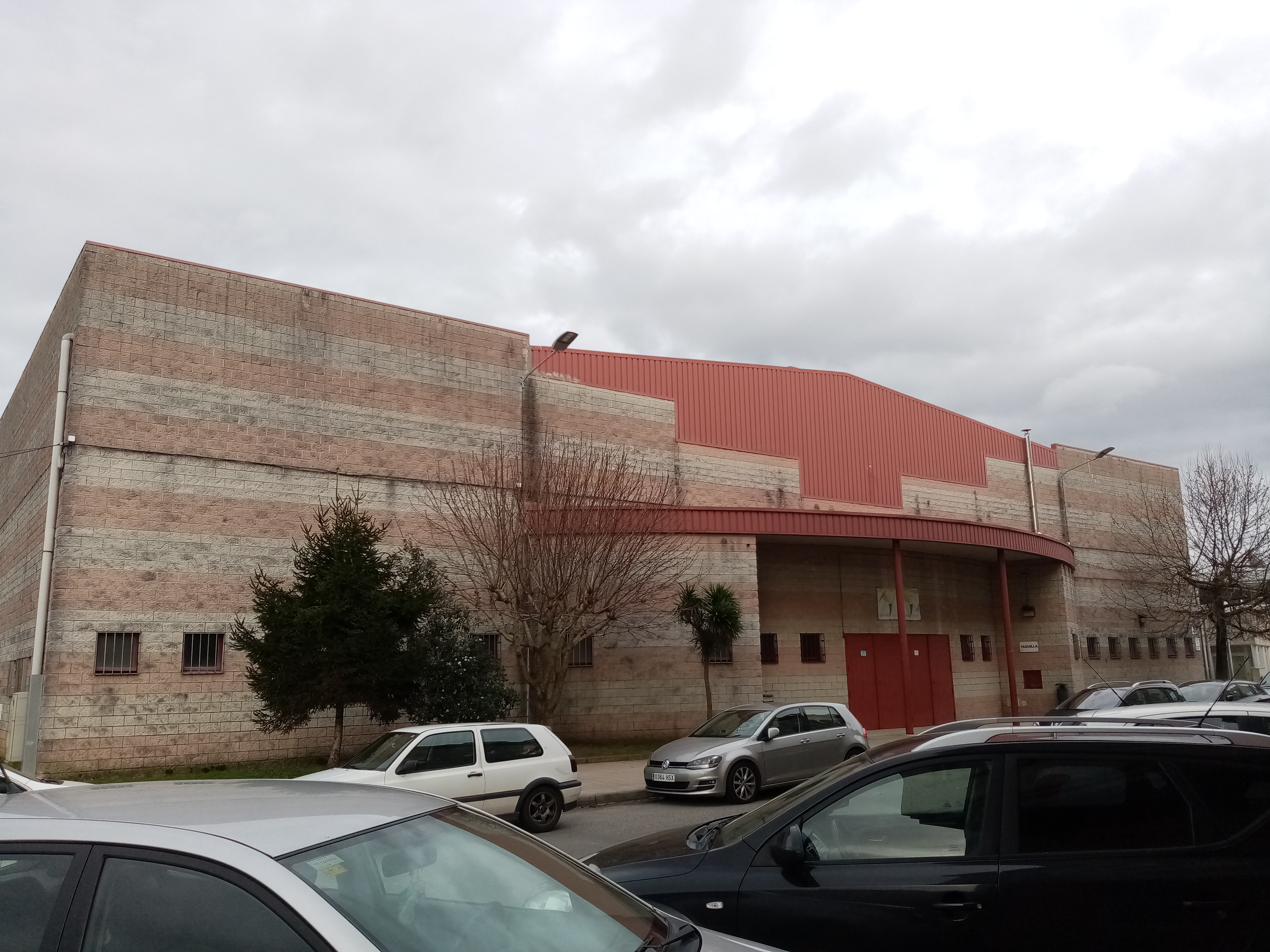 Vista do Pavillón Carballo Calero de Carballo.